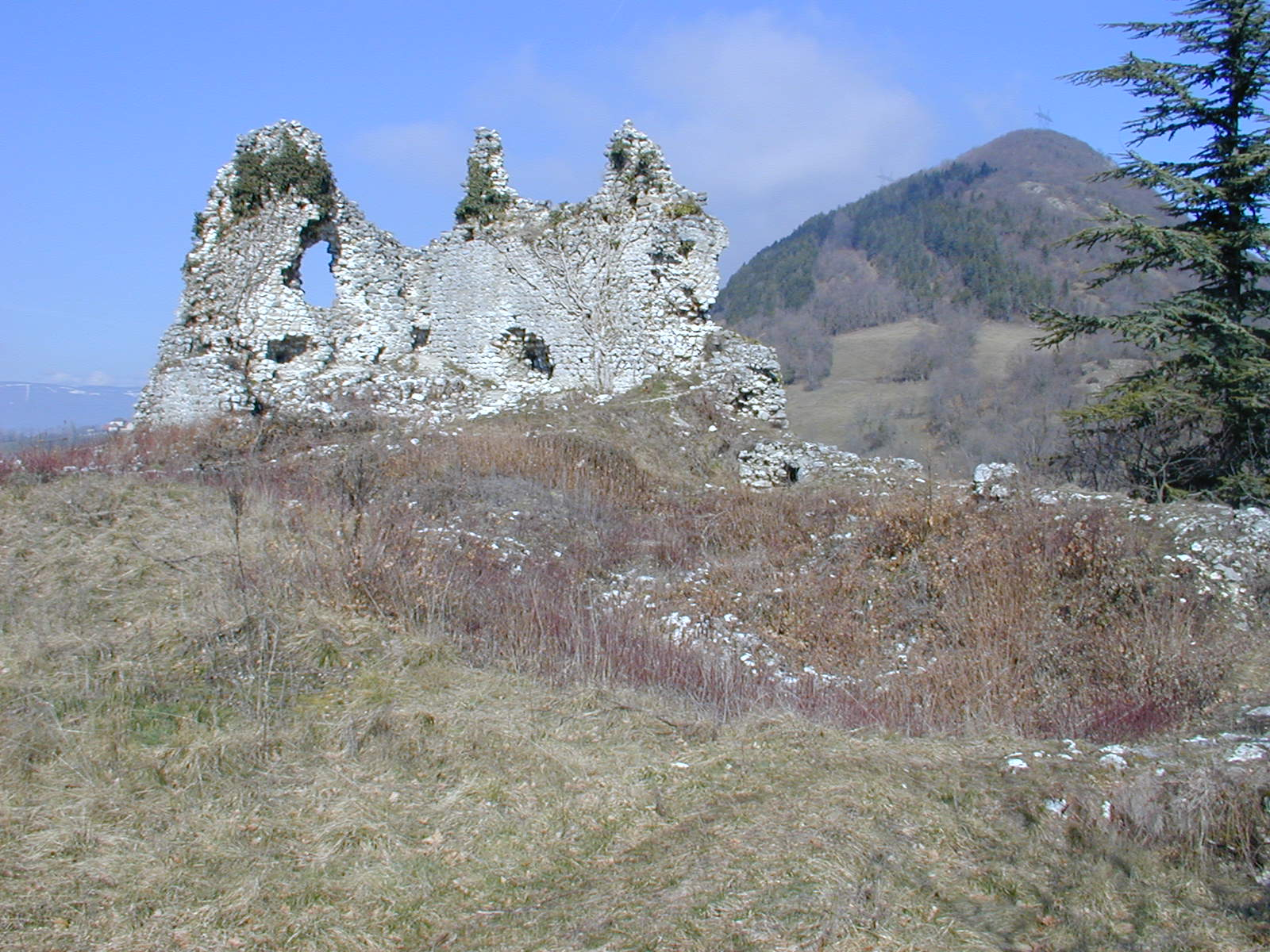 Ruines du donjon du château de Chaumont (Haute-Savoie)